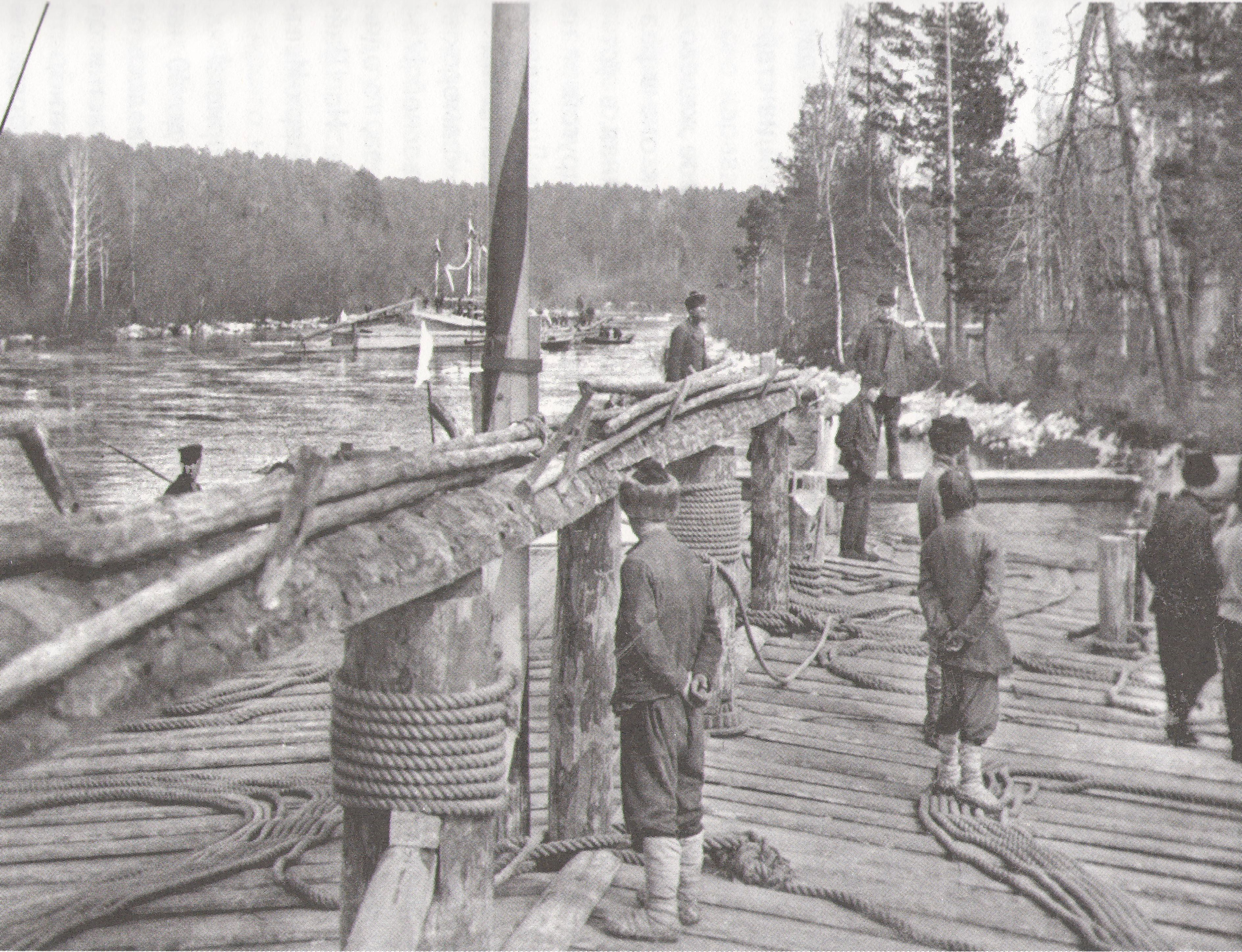 Барка на реке Чусовая